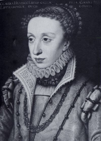 Claudia de Valois, Princesa da França e Duquesa de Loraine, terceira filha sendo a segunda menina do rei Henrique II da França e Catarina de Medici, Esposa do Duque Charles II de Loraine, mãe do Duque Henrique I de Loraine.